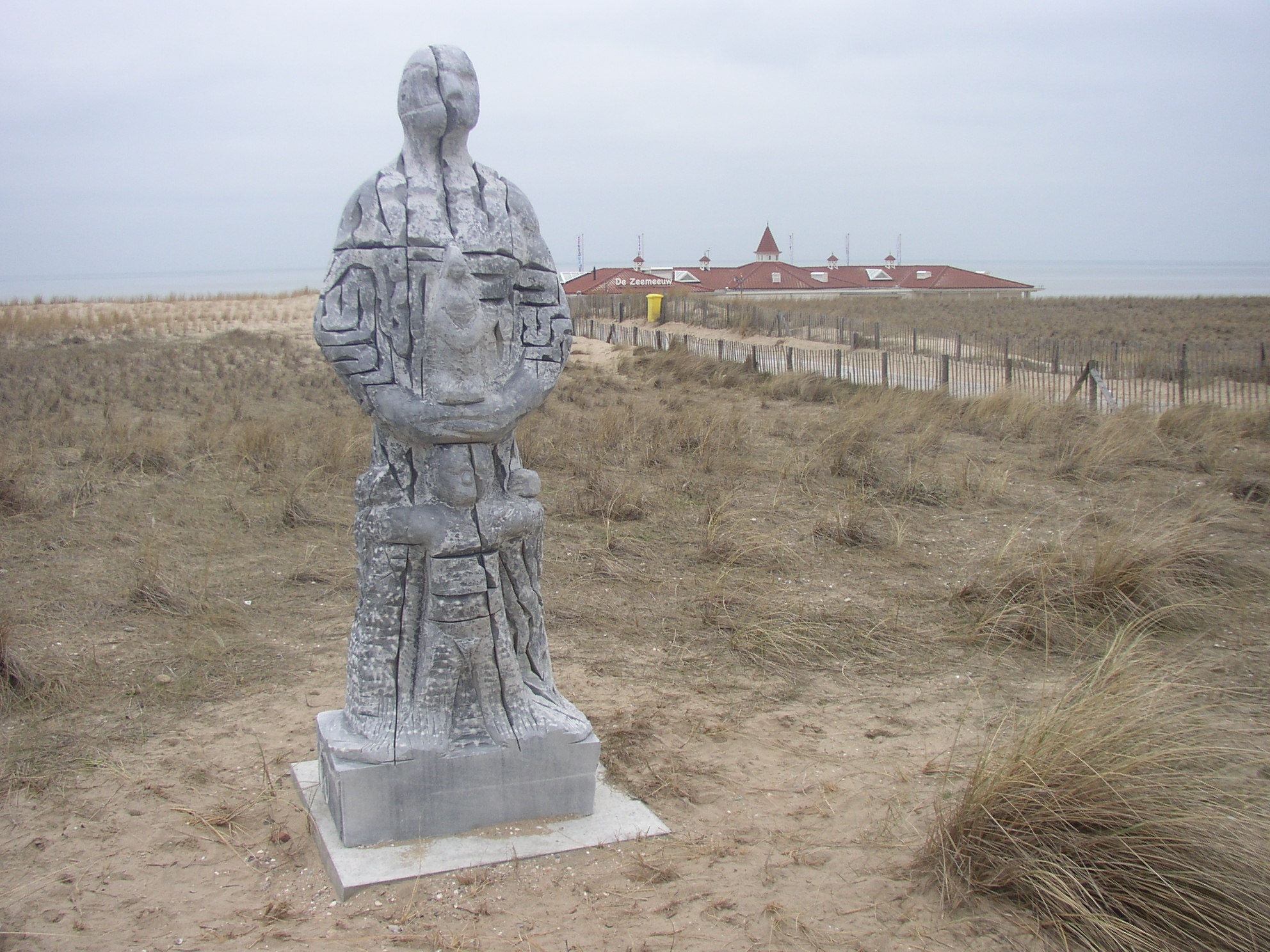 Family, beeld marmer, Jurriaan van Hall